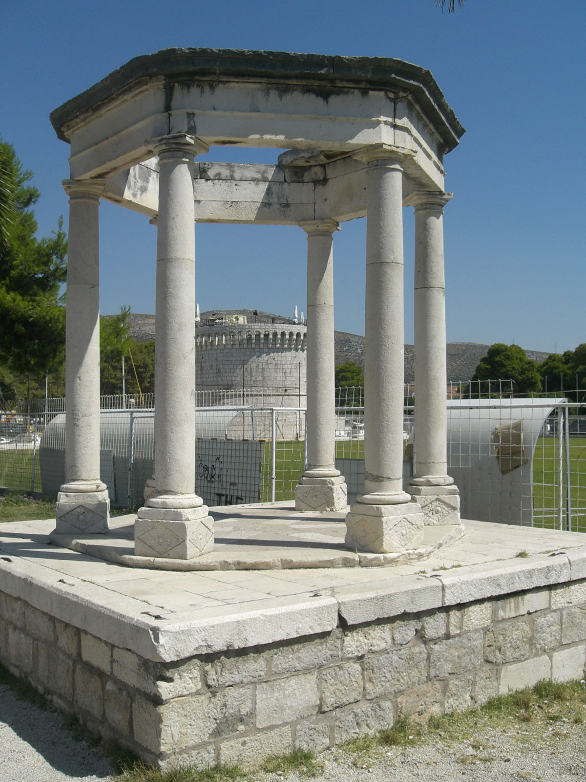 Trogir: Glorijet, kula sv. Marko i igraište Batarija